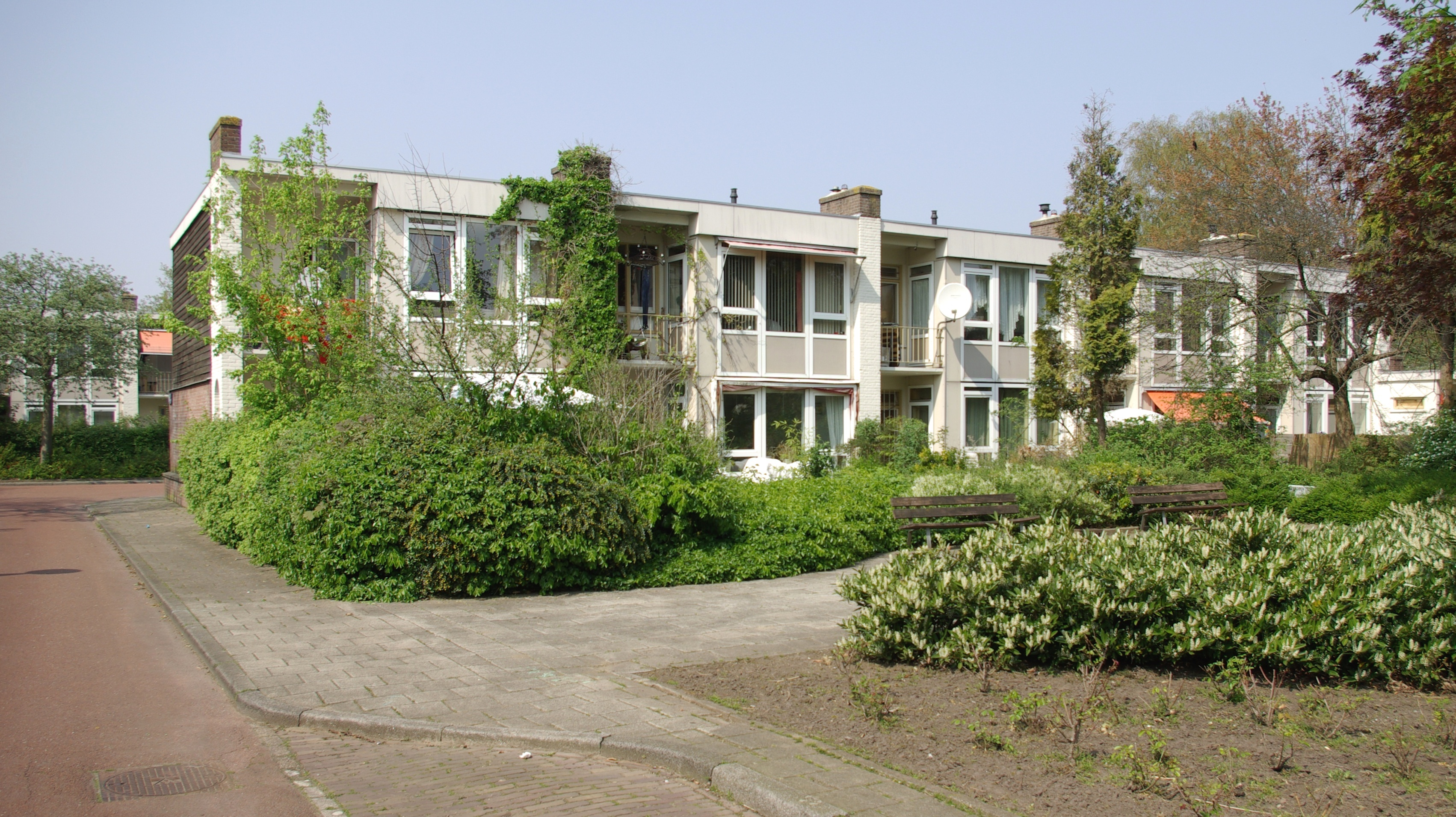 De wijk Jeruzalem in Amsterdam-Oost. De stedenbouwkundigen en architecten Cornelis van Eesteren, J.H. Mulder, B. Merkelbach, Ch.J.F. Karsten, Piet Elling en M. Stam zijn de ontwerpers. De woningen zijn gebouwd tussen 1950 en 1954. Na voordracht in 2007 via de lijst van rijksmonumenten uit de periode 1940-1958, opgesteld door Ronald Plasterk, werd de wijk Frankendaal/Jeruzalem erkend als rijksmonument.